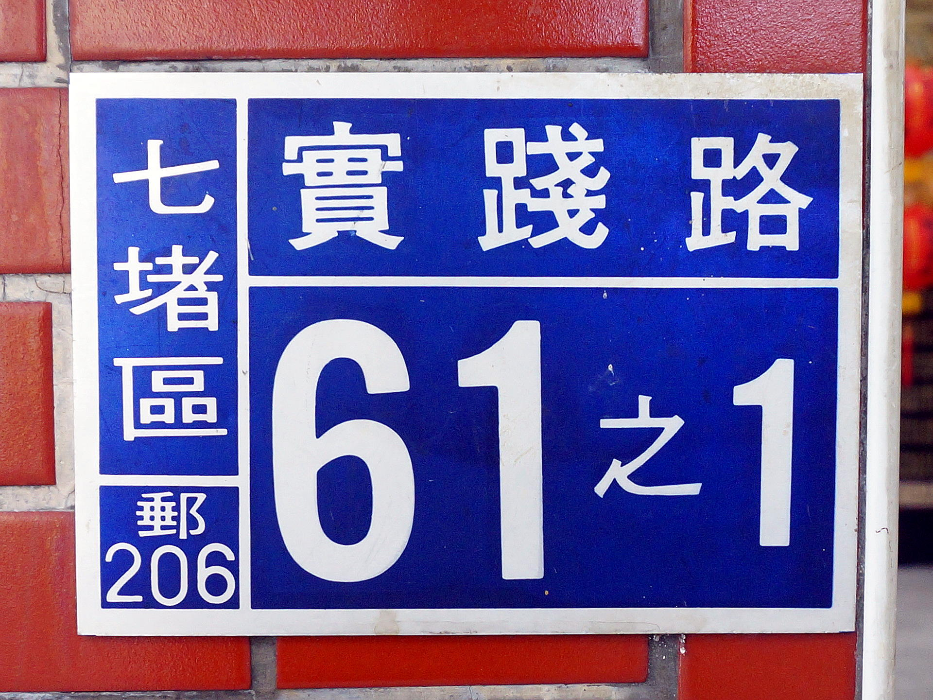 中文（台灣）: 百福中埔福德宮門牌號碼：基隆市七堵區實踐路61之1號。